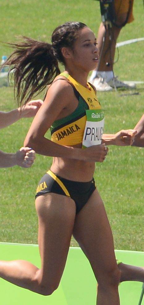 Finale du 3000m steeple des jo de Rio 2016: Aisha Praught